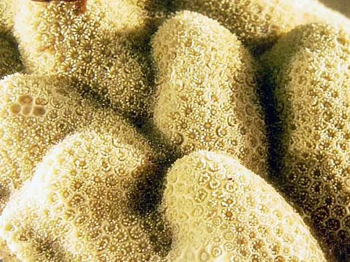 Porites lobata en el Parque Histórico de Kalaupapa, Hawái